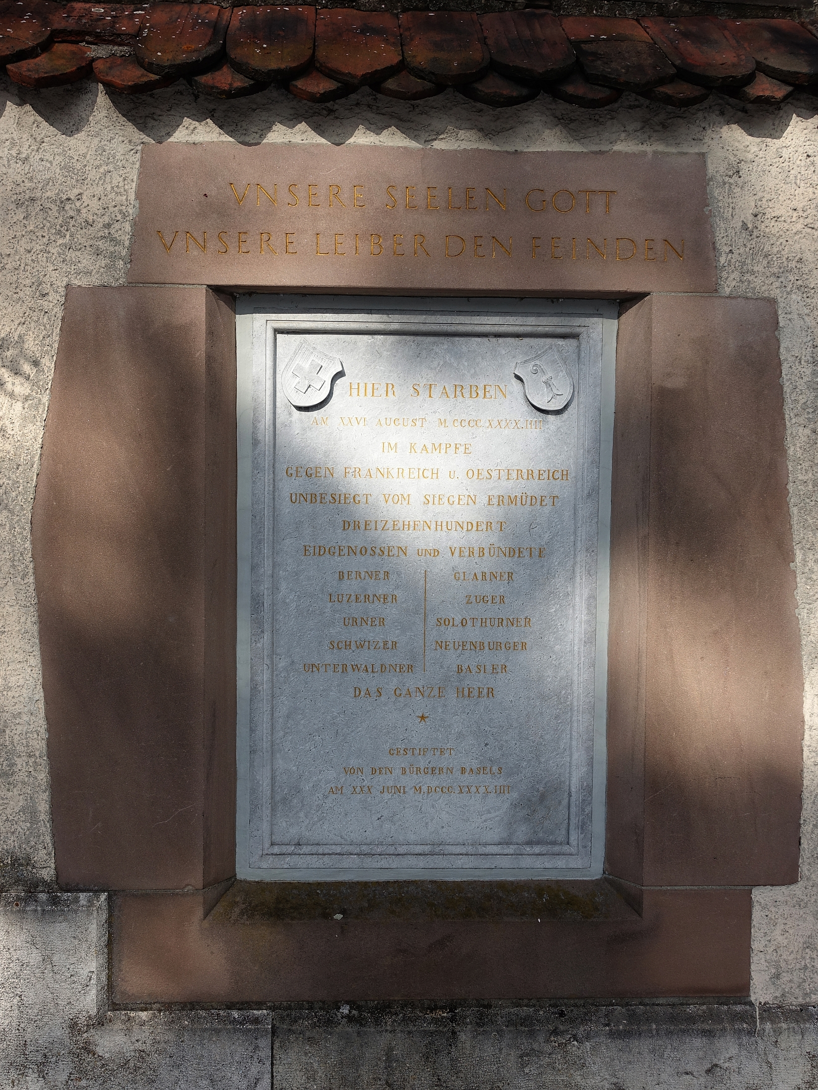 Gedenkinschrift, St.Jakobs Kirche, Jakobskapelle, in Basel